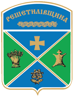 Герб Решетилівського району